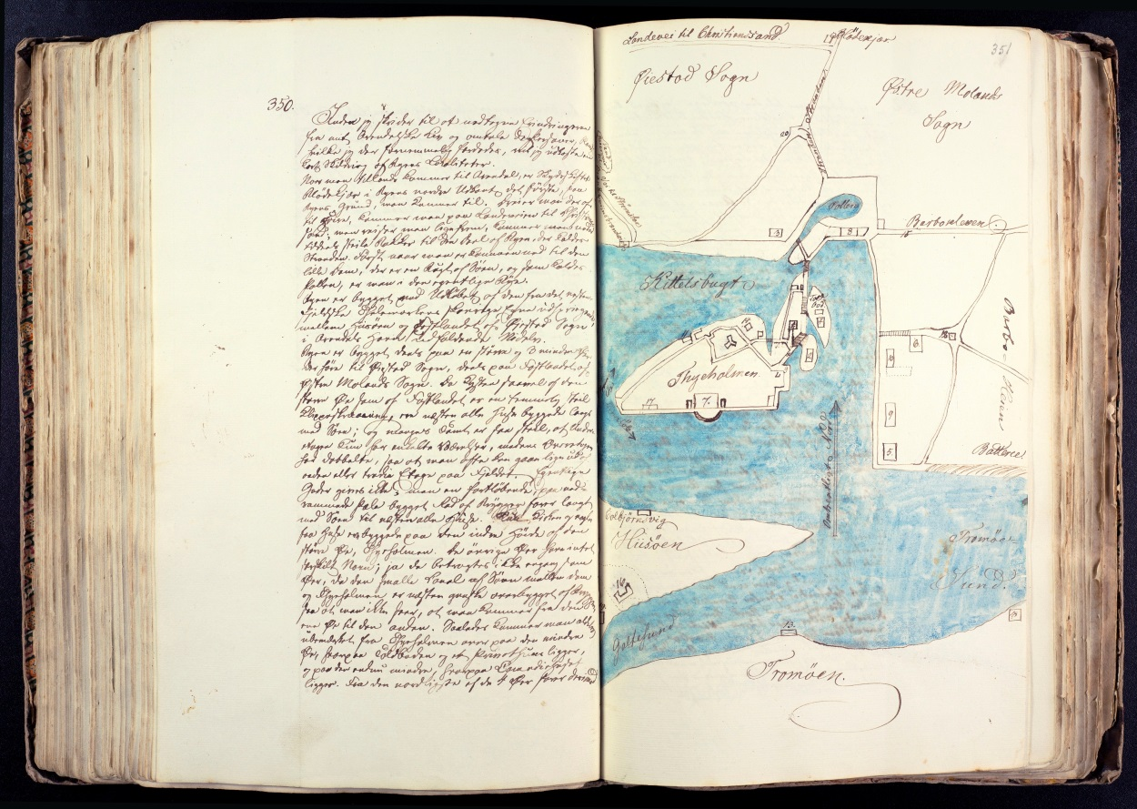 Utsnitt av Conrad N. Schwachs erindringer.